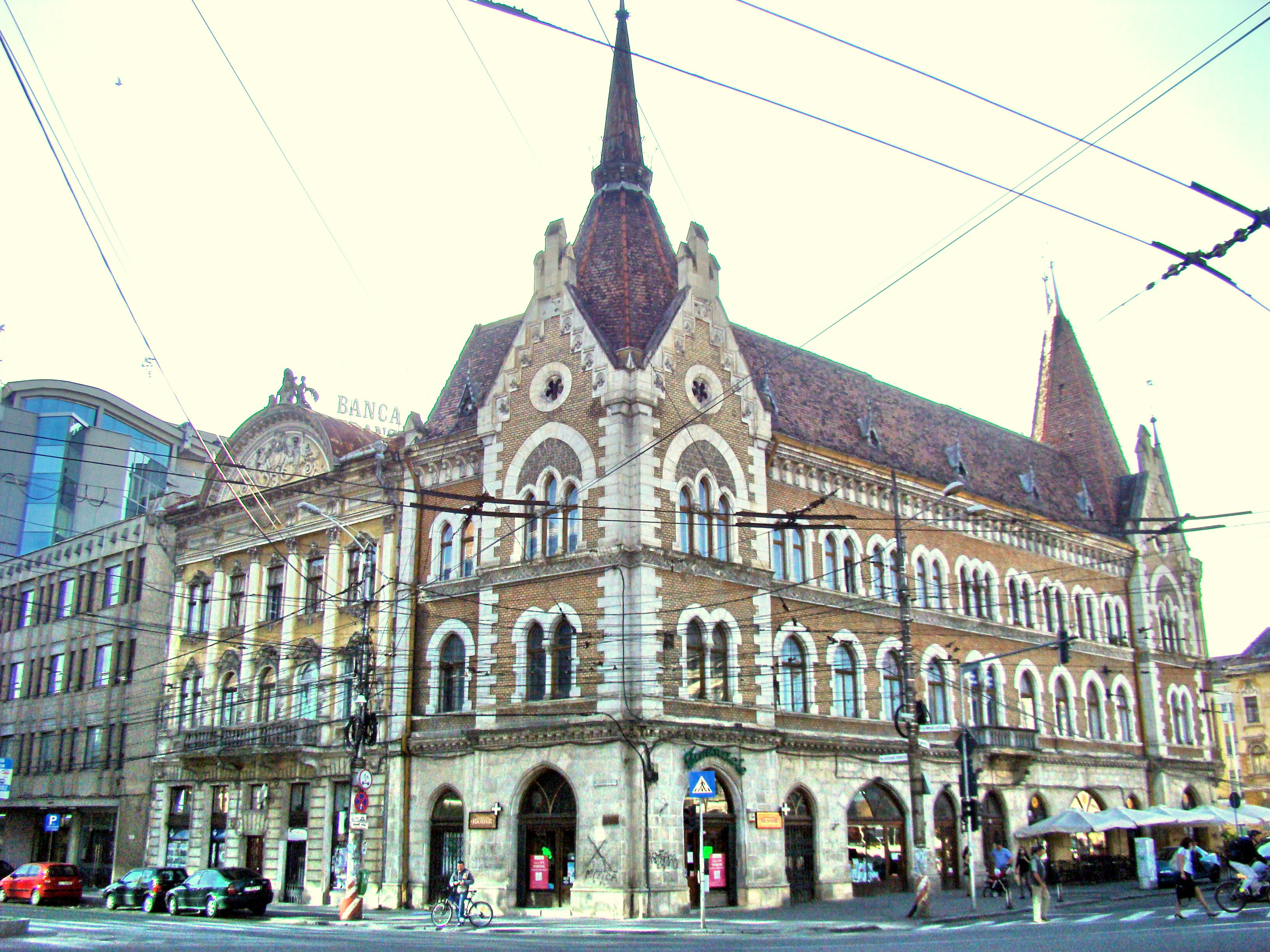 Clădire monument istoric, str. Barițiu, nr.2